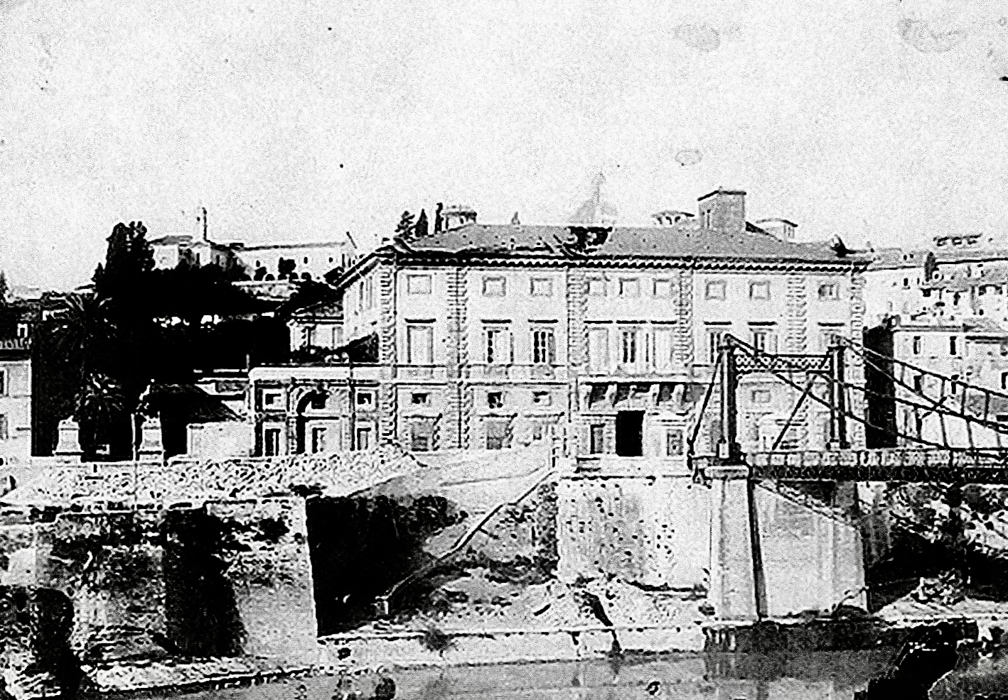 Roma, palazzo Salviati alla Lungara. Sulla destra, il ponte dei Fiiorentini (popolarmente detto Ponte del soldino). Costruito tra San Giovanni dei Fiorentini e piazza della Rovere da una società privata nel 1863 e demolito nel 1941 e sostituito dal ponte Pincipe Amedeo, richiedeva un pedaggio di 5 centesimi (1 soldo) per essere attraversato. La foto è precedente alla costruzione dei muraglioni (1875-1900).